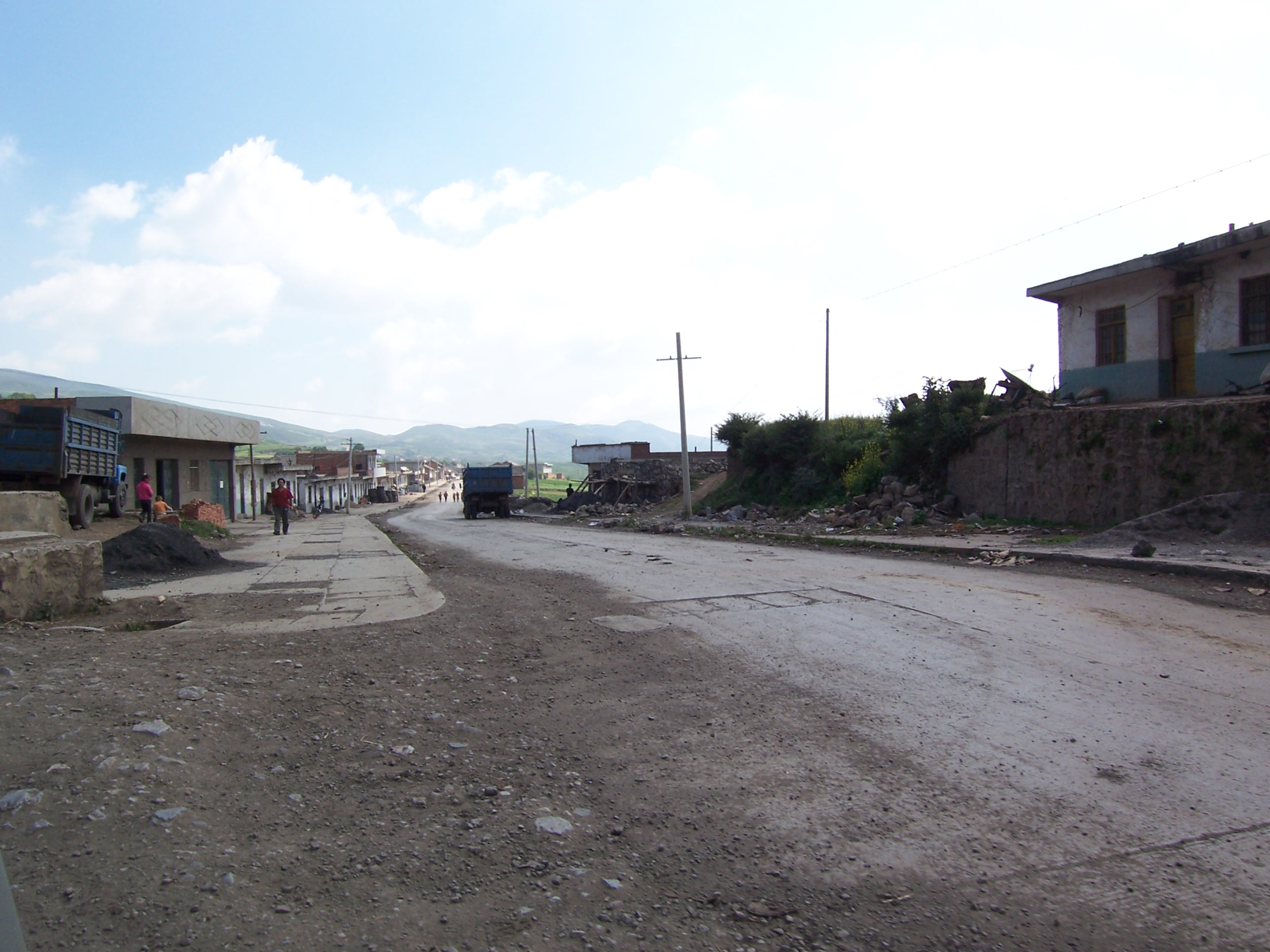 宁边村-当年朱镕基总理落泪的地方